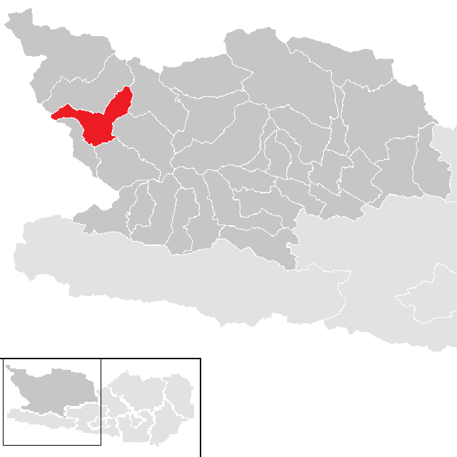 Bezirk Spittal an der Drau